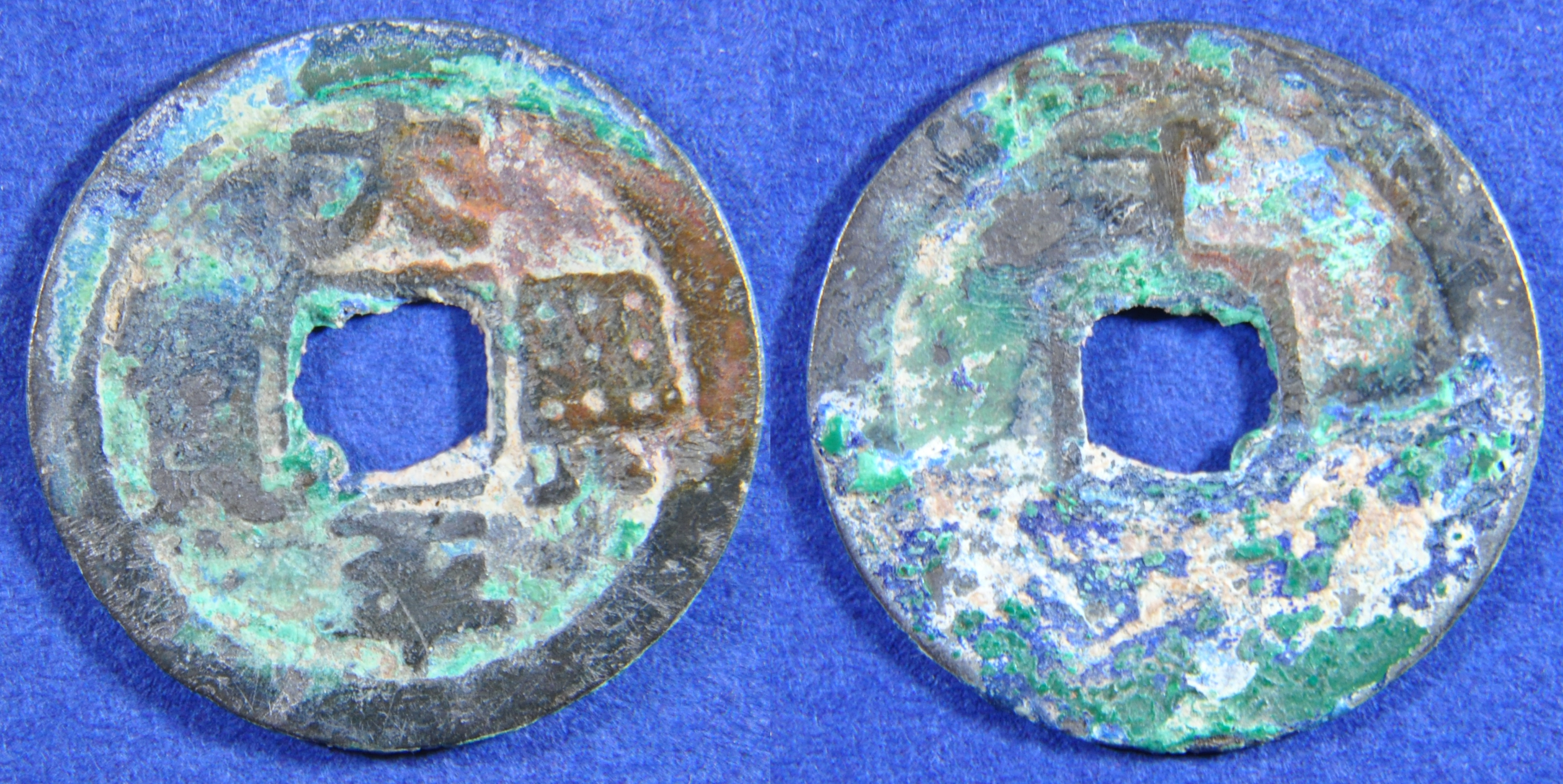 Une monnaie d'une sapèque en bronze de Dinh Bo Linh (968-979) de la dynastie Dinh (968-980), ère Thai Binh (970-979). C'est la deuxième dynastie du Vietnam qui à l'époque s'appelait Dai Co Viet. La première est celle des Ngo (939-968). Le dernier souverain, Ngo Xuong Xi, est contesté par des seigneurs de la guerre. Dinh Bo Linh va les vaincre et se proclame empereur sous le nom de Dinh Tien Hoang De. Il est assassiné en 979 ainsi que son fils. Le général Le Hoan gouverne avec la régence de l'impératrice Duong Van Nga et un enfant empereur, Dinh Phe De ou Dinh De Toan. Le général épouse l'impératrice et fonde la dynastie des Le antérieur. A/ Thai Binh Hung bao (Monnaie florissante de l'ère Thai Binh) R/ Dinh, en haut (Nom de la dynastie) Dimension : 24.25 mm Poids : 2.2 g. Remarque : C'est la première monnaie officielle du Vietnam. Elle porte sur le revers le nom de la dynastie pour s'affirmer face à son puissant voisin, la Chine, dont il s'est débarrassé depuis peu de temps (939). L'indépendance est encore fragile. Il s'agit aussi de s'affirmer face aux grandes familles vietnamiennes qui se sont révoltées les 20 dernières années qui précèdent la dynastie. D'ailleurs, le terme "Hung" a deux sens : il signifie aussi "restauration" et l'inscription signifie alors : "Monnaie de la restauration (du pays) pendant l'ère Thai Binh " sous la dynastie Dinh. D'après F. Thierry, cette monnaie a été émise en petite quantité car on en trouve peu dans les trésors de l'époque, c'est donc une monnaie de propagande intérieure et extérieure. D'après Novak, il y a 7 types différents. Références : Schroeder #1; J.A. Novak Type 5B ; Toyo #209 Indice de rareté : Peu commune